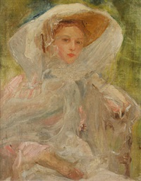 Portrait de jeune femme à chapeau par Albert de Belleroche, vers 1900, collection particulière.52 x 42 cm.